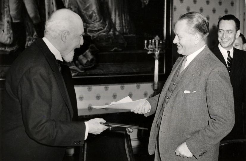 De Amerikaanse ambassadeur in Nederland, dr. Herman Baruch (links) en de Nederlandse minister van Buitenlandse Zaken mr. Dirk Stikker met het op zijn ministerie ondertekende bilaterale akkoord betreffende de rechtenvrije invoer van reliefgoederen uit het Marshallplan, Den Haag 17 januari 1949.